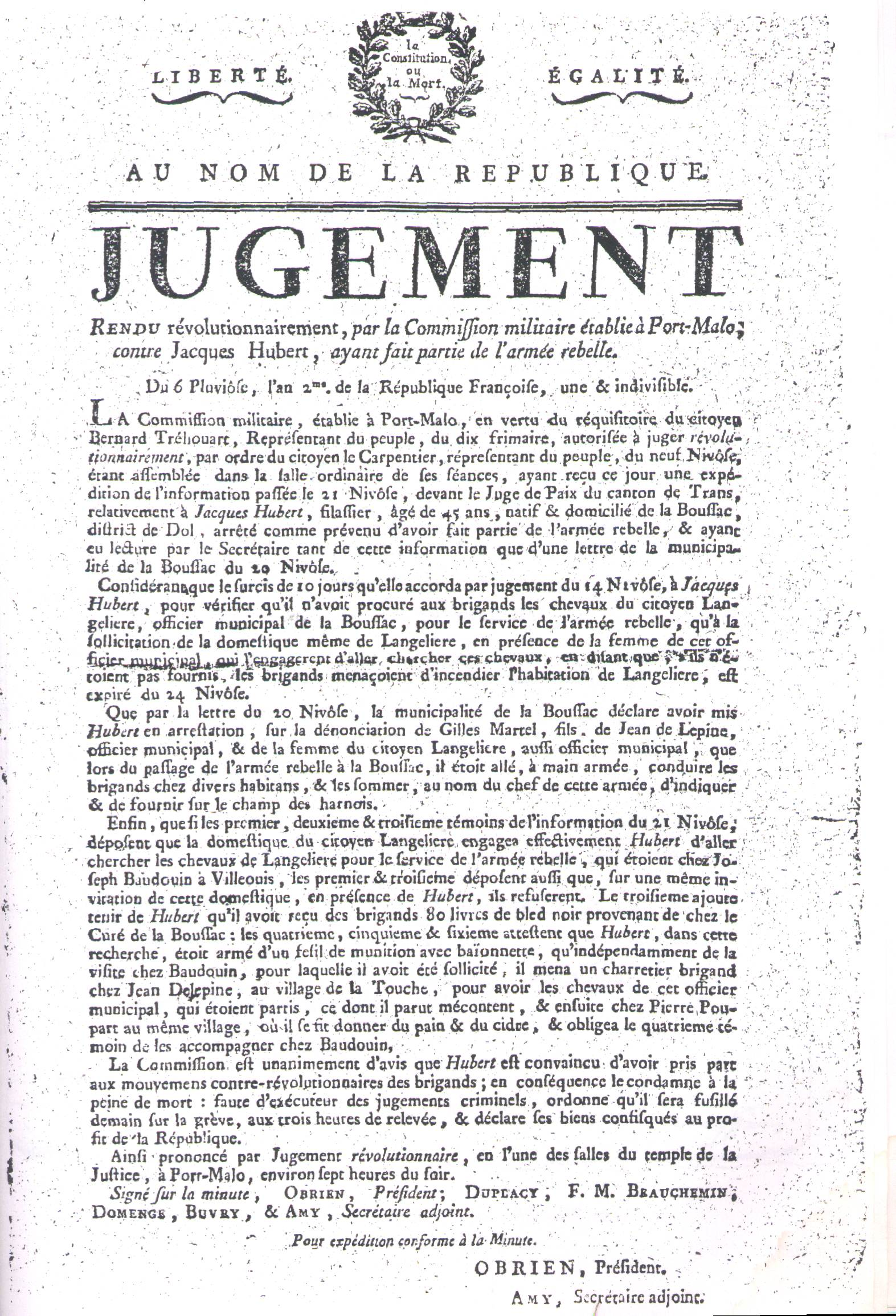 Jugement imprimé de la Commission militaire révolutionnaire siégeant à Saint-Malo, dite O'Brien, en l'an II, condamnant un habitant de la commune de La Boussac (Ille-et-Vilaine) à être fusillé sur la grève pour avoir fourni des chevaux aux contre-révolutionnaires ("rebelles"). Plusieurs de ces condamnations de ce tribunal d'exception ou d'autres ayant siégé en Ille-et-Vilaine ont été imprimés en format A3 ou plus pour être affichés aux lieux les plus judicieux. Publié en annexe de «Le jugement des Chouans par les commissions militaires d'Ille-et-Vilaine, 1793-1795», Hervé Tigier, Cercle généalogique d'Ille-et-Vilaine, 1988.